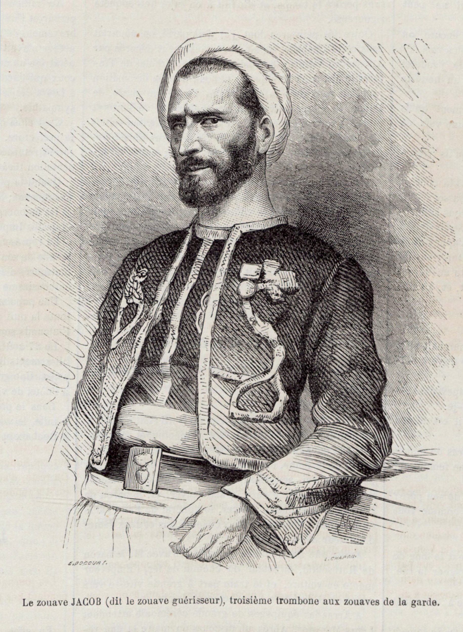 Gravure dans Le Monde illustré.